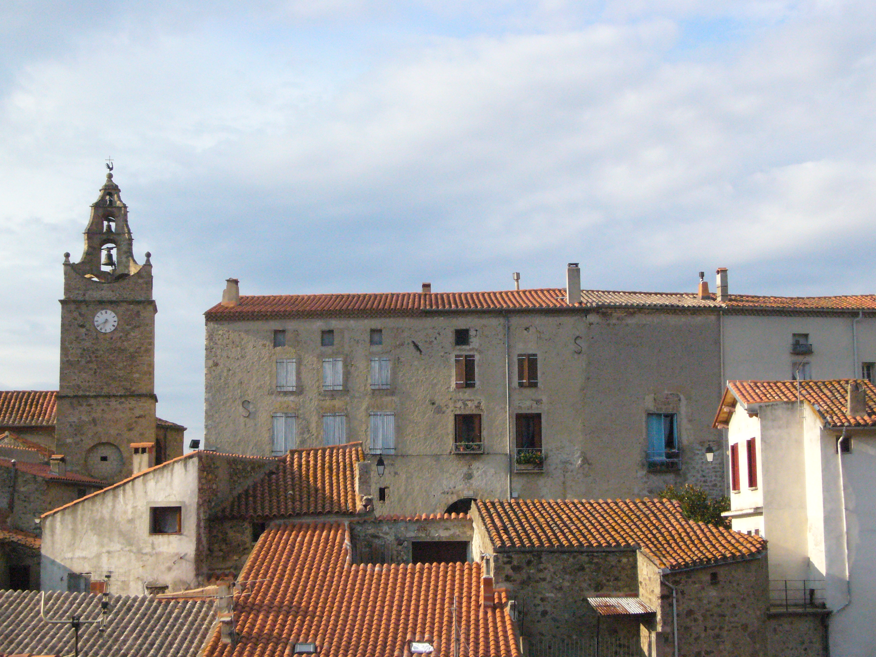 Le clocher de l'église Saint-Étienne et l'ancien château de Caramany (66, France)